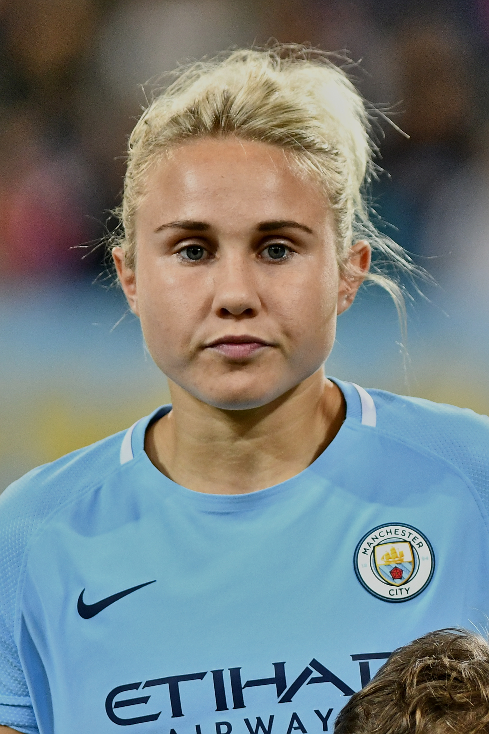 UEFA Women's Champions League 2017/18, Runde der letzten 32, SKN St. Pölten gegen Manchester City W.F.C. am 4.10.2017, Bild zeigt: Izzy Christiansen